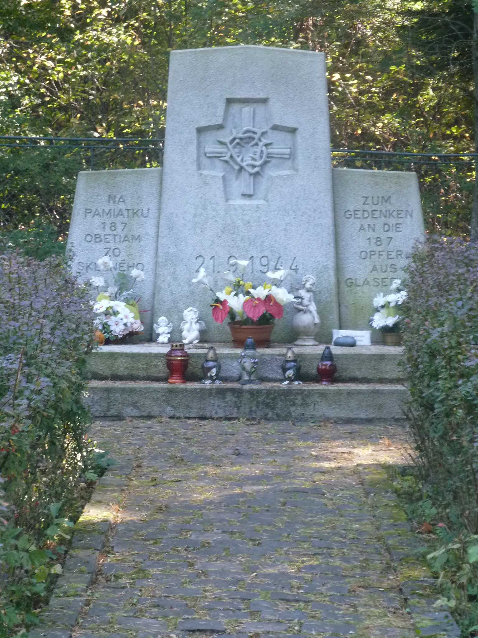 Pamätník nemeckých obyvateľov dediny Sklené povraždených partizánmi v roku 1944.